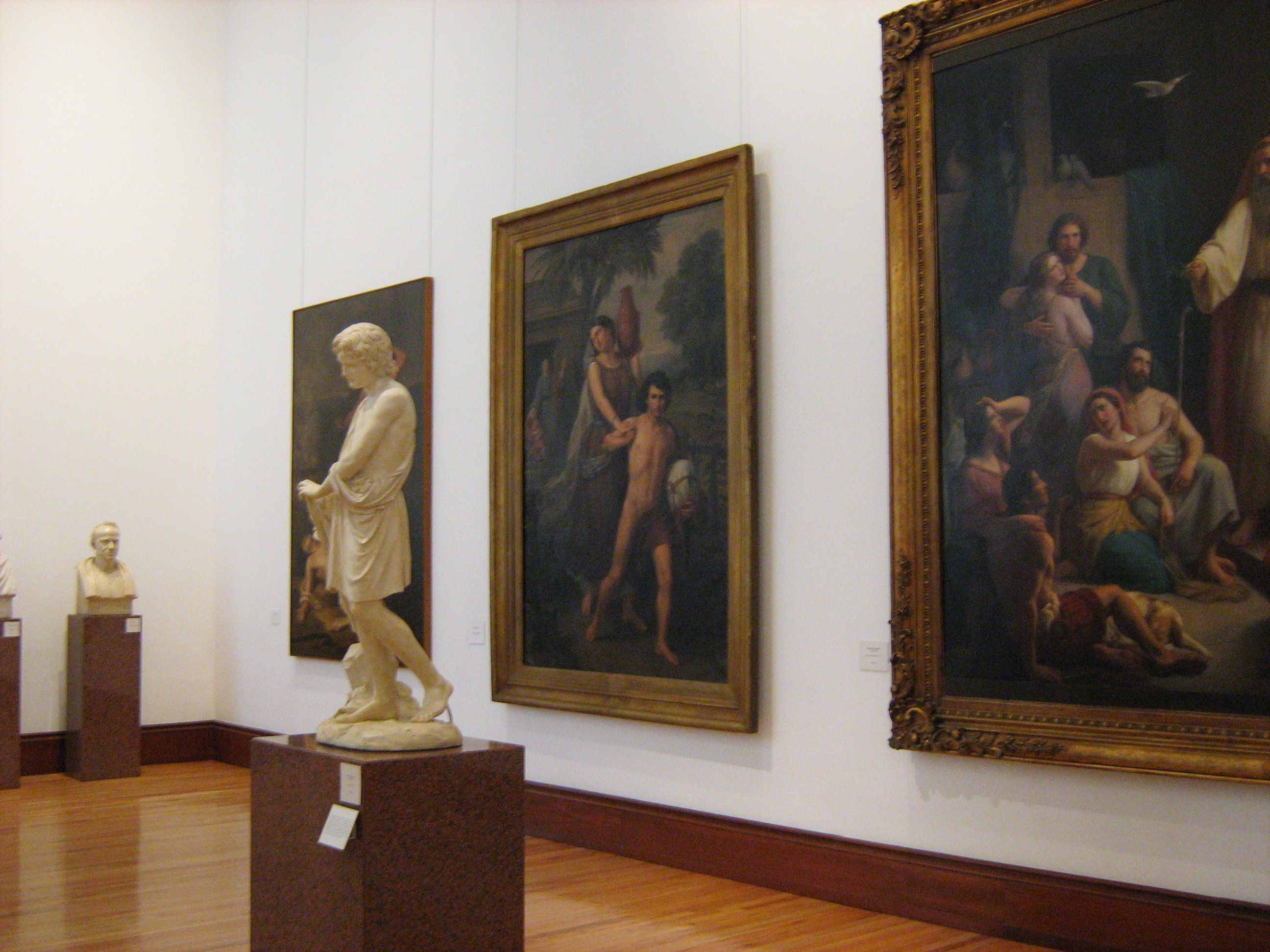 Pinturas y esculturas al interior del Museo Nacional de Arte en México, D. F.